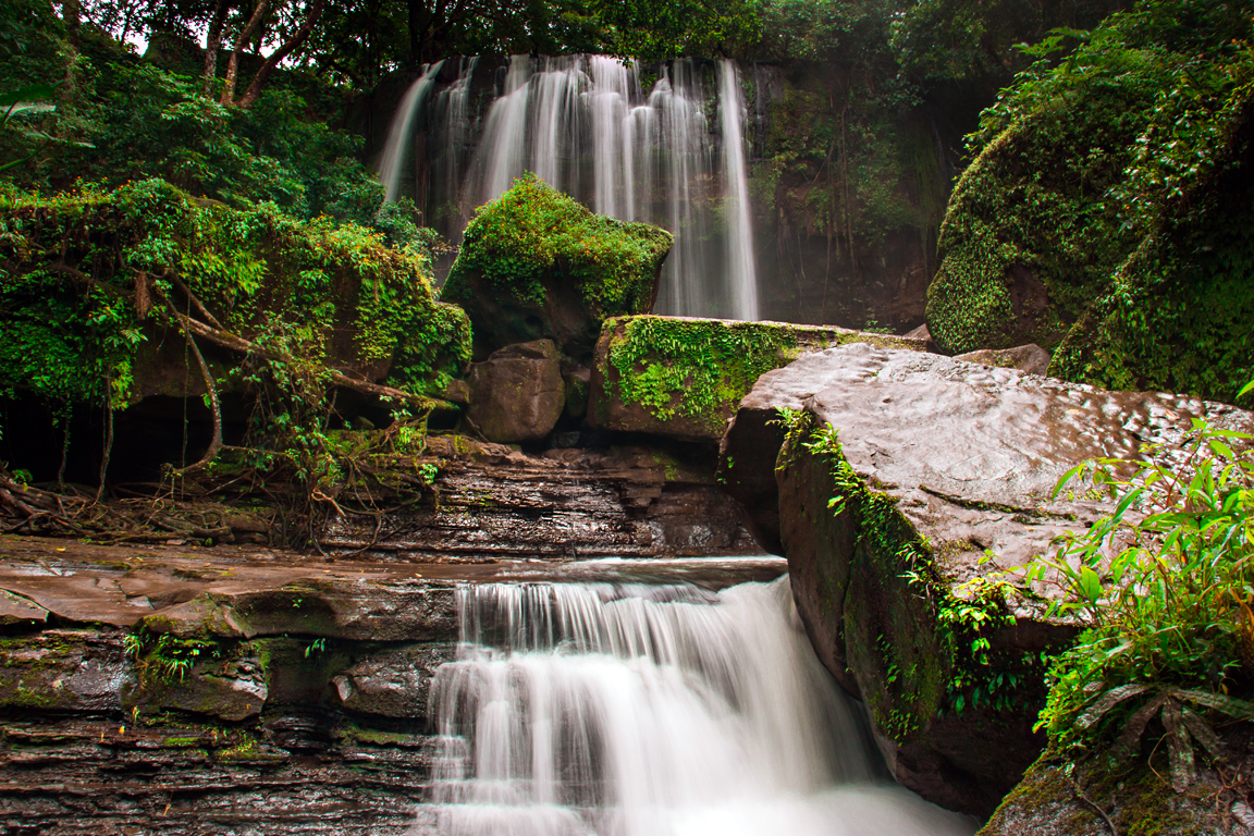 Air Terjun Padang Lampe